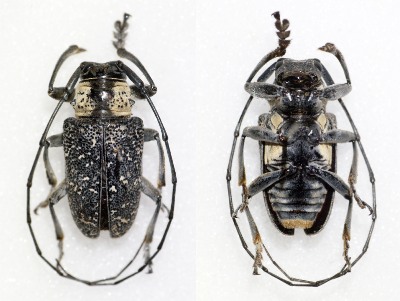 Jordan,1894 Sex: Male Data: 10-2013 - Ebogo - Cameroon Size: ?